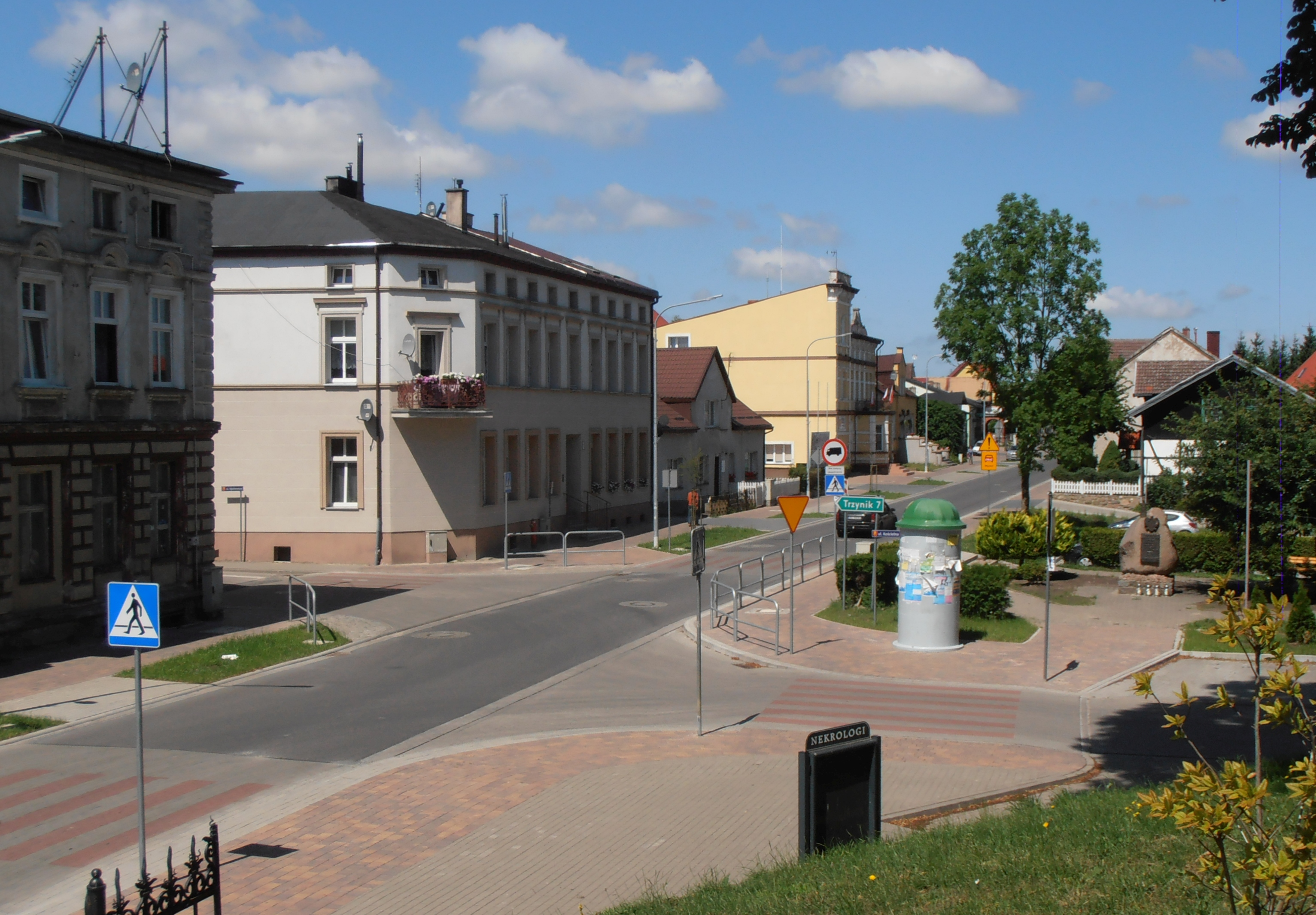 Gościno. Widok ogólny z wzgórza kościelnego.